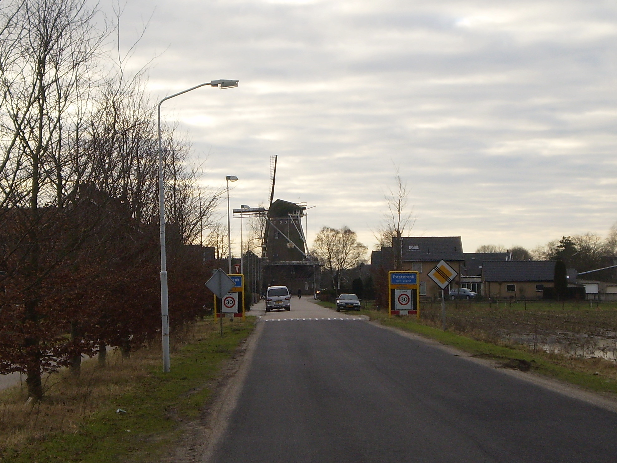 Posterenk, Voorst, NL, vanuit het oosten gezien. In het midden de Wilpermolen